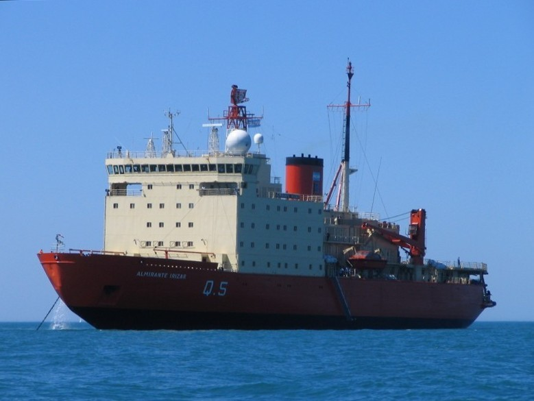 Icebreaker (Q-5) ARA "Almirante Irizar"